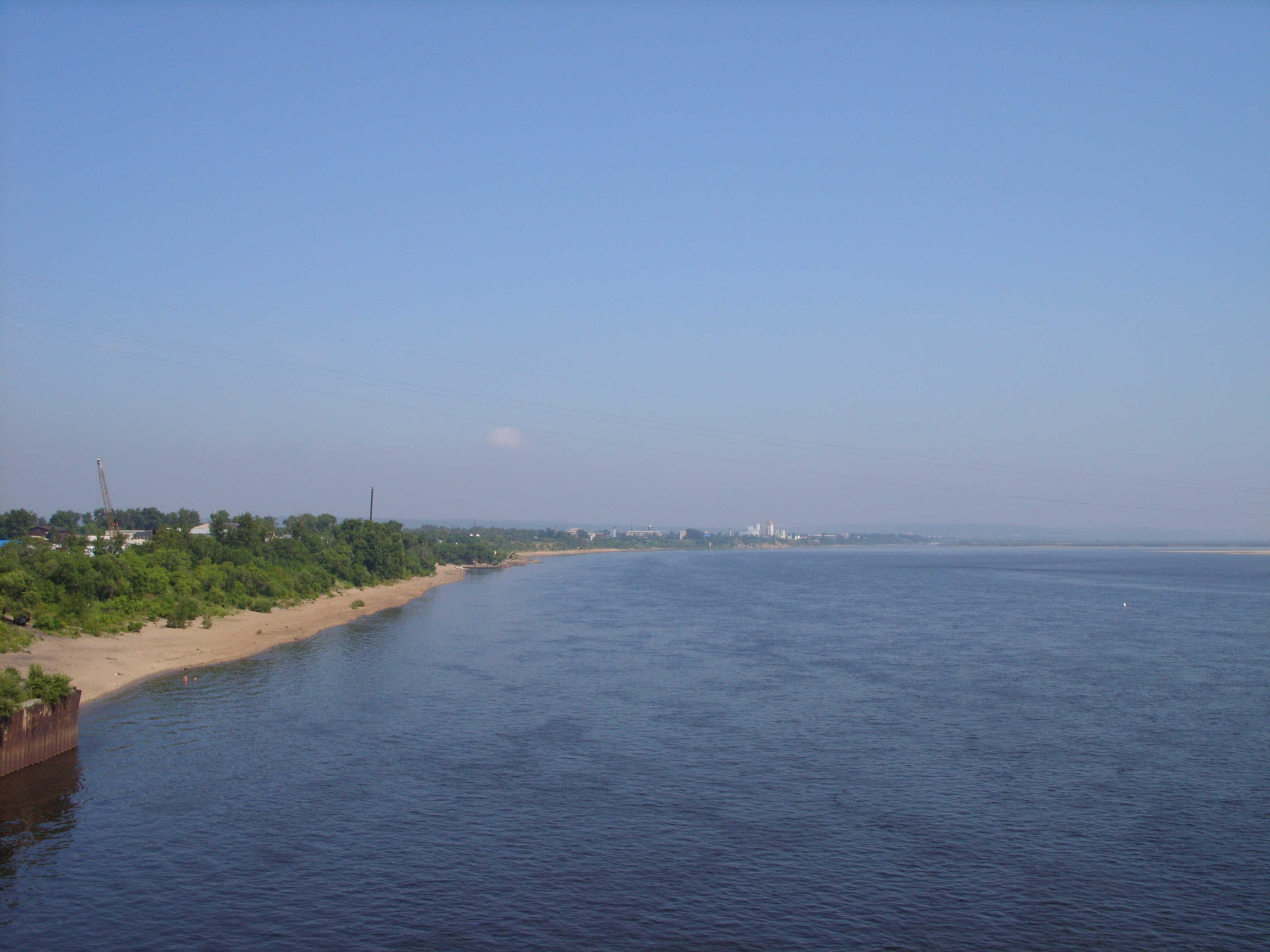 Снимки августа 2011 г.